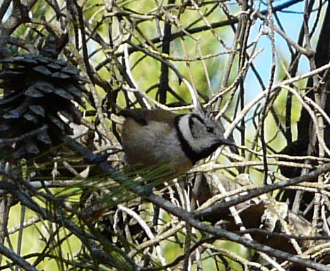 Mallerenga emplomallada (Parus cristatus) a Collserola, probablement entre Can Amigó del Clot i el coll d'en Cuiàs (Sant Feliu de Llobregat).